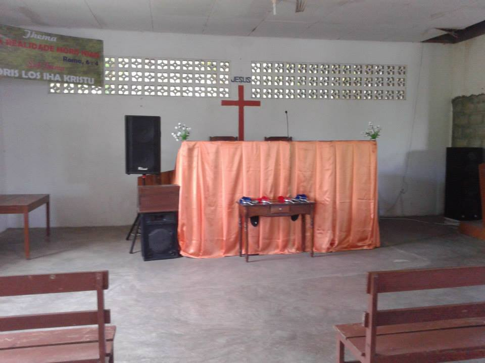 Atauro